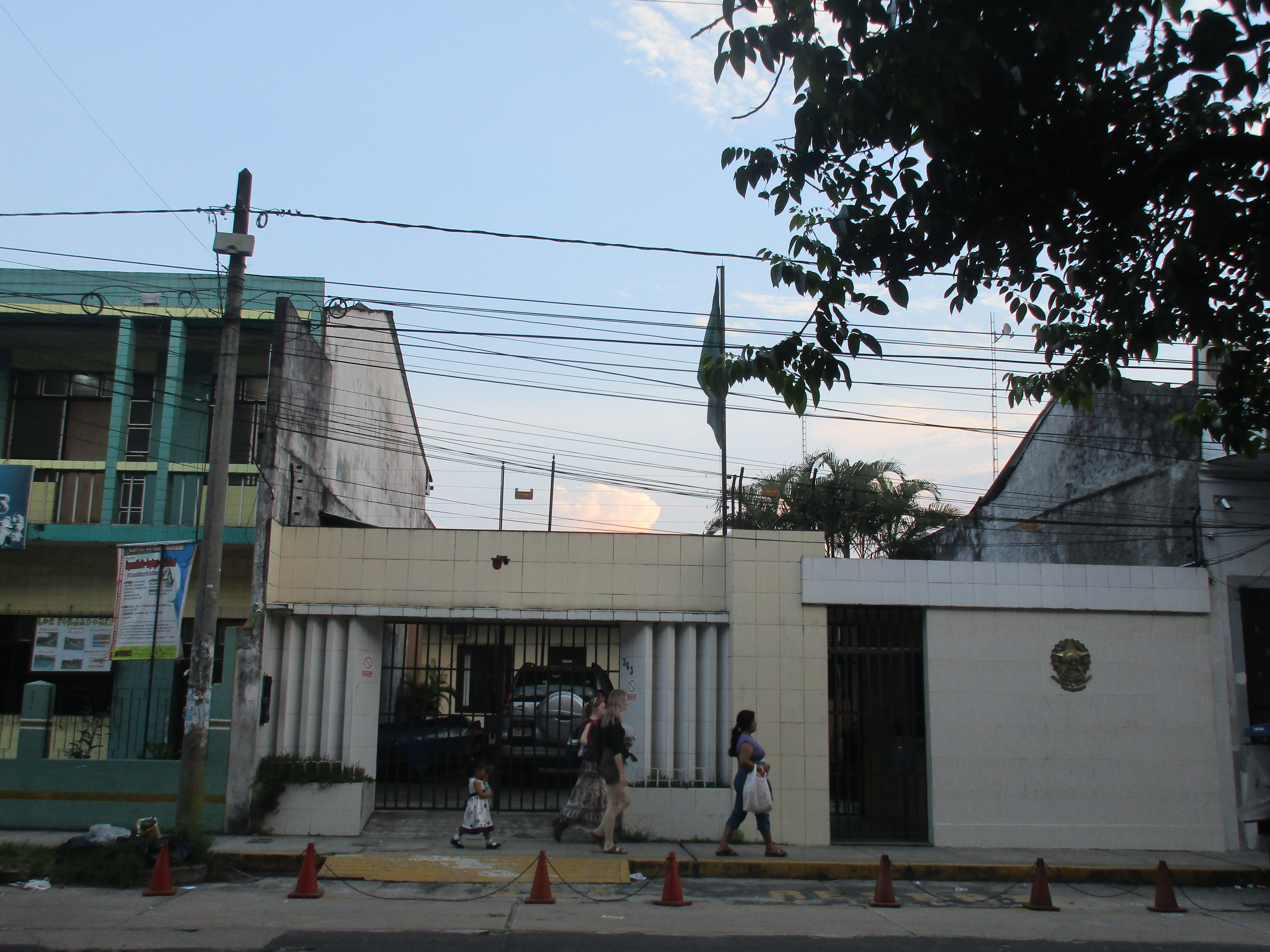 Consulado de Brasil en la ciudad peruana de Iquitos